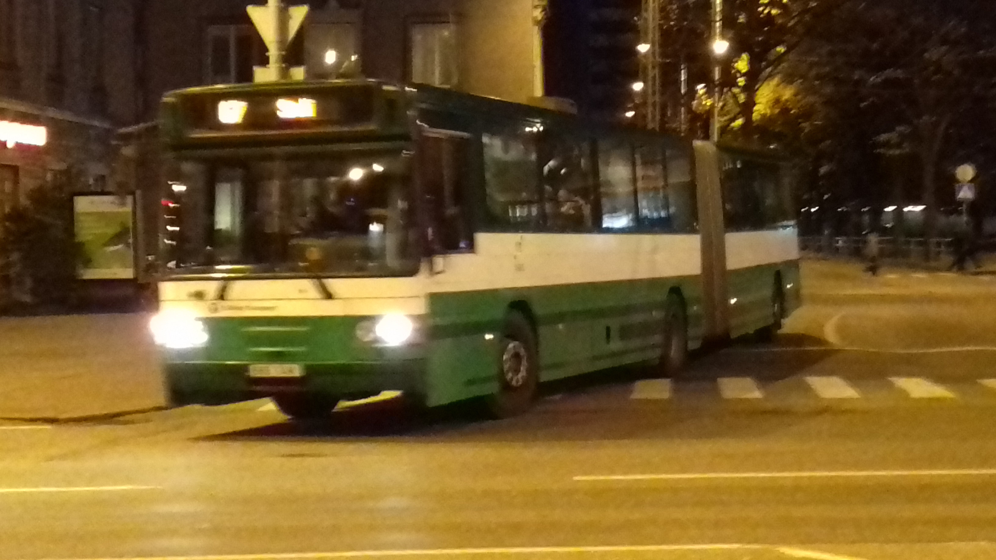 3663 Teatri väljaku tänavast keerab Estonia puiesteele